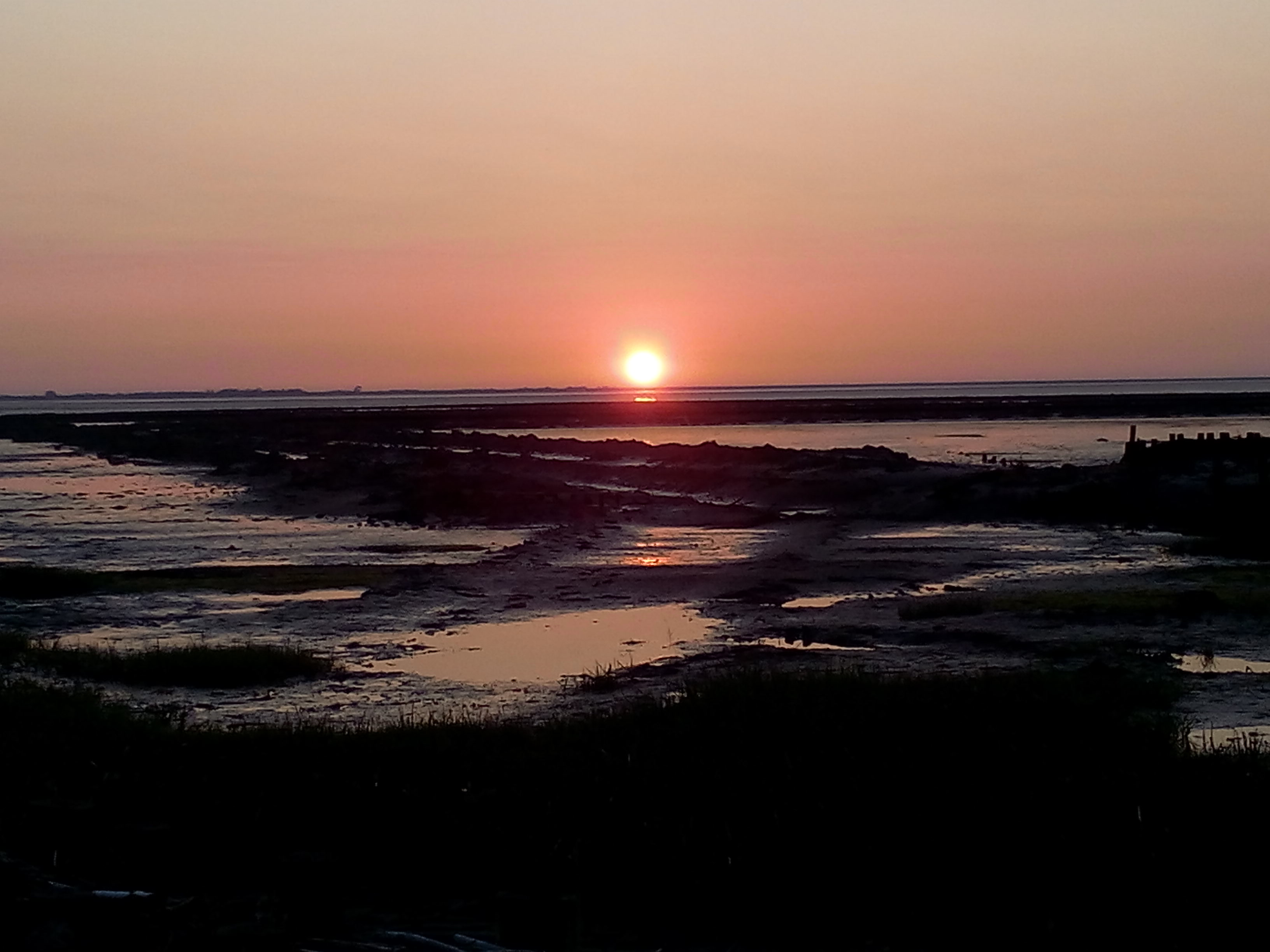 Nach einem wunderschönen Picknick mit meiner Tochter noch eine Wattwanderung bei Sonnenuntergang.